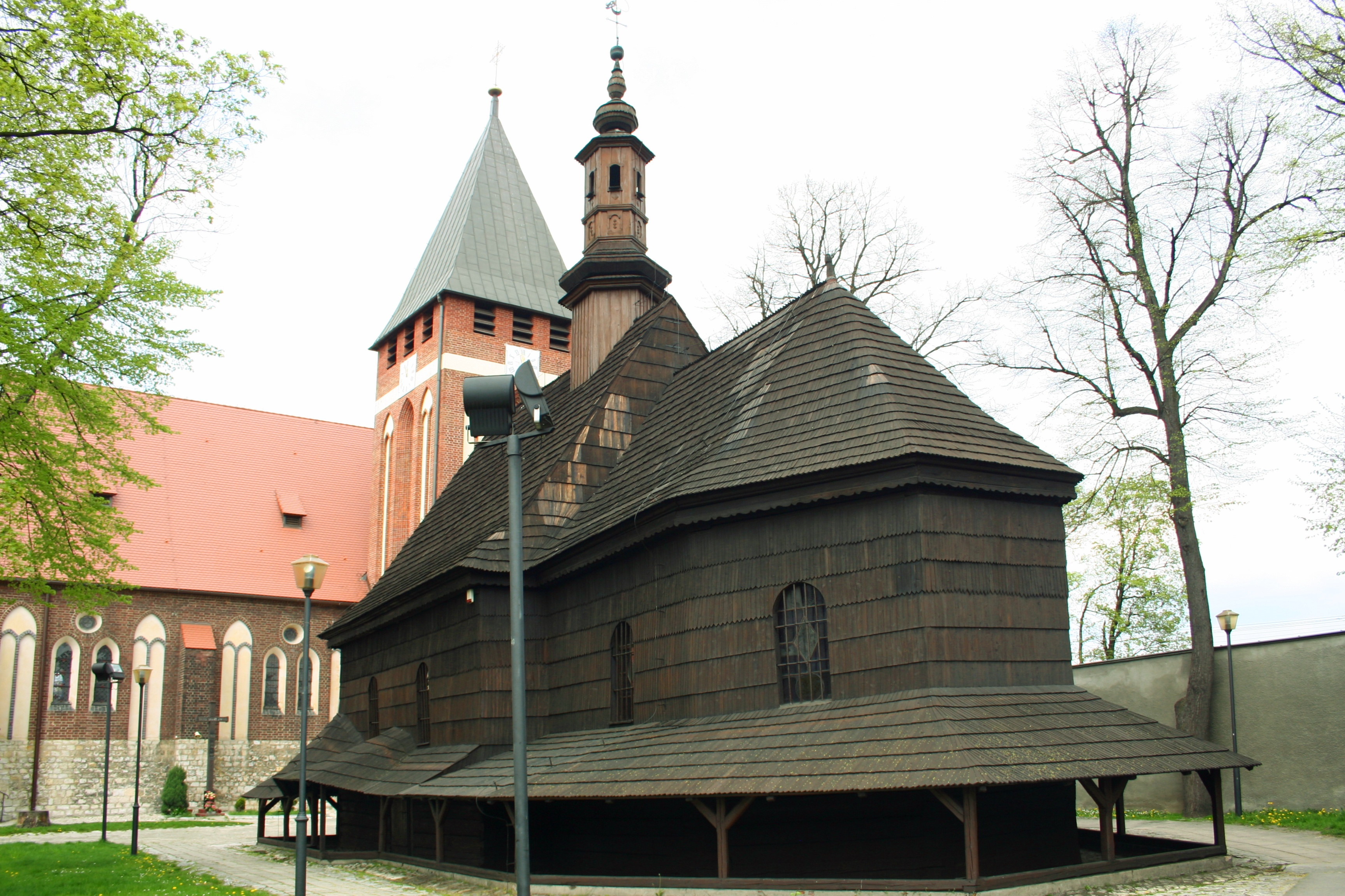 zabytkowy kościół Wniebowzięcia NMP w Miasteczku Śląskim, Polska, województwo śląskie, powiat tarnogórski